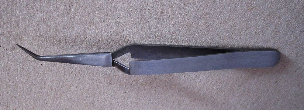 Festhaltepinzette aus Edelstahl, gebogen